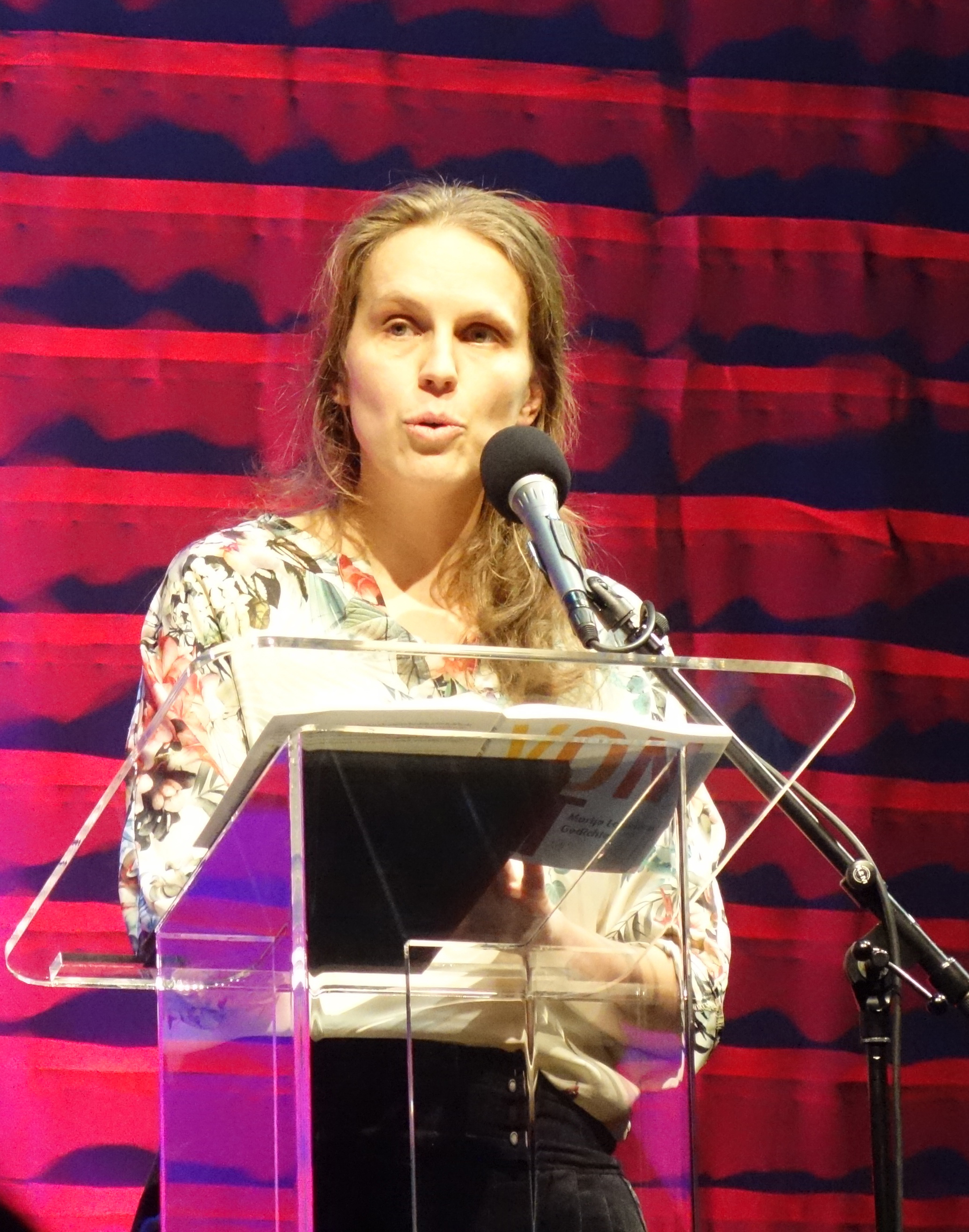 Marije Langelaar tijdens Winternachten 2018 (Writers Unlimited), Den Haag. Jan Campert-prijs voor haar bundel Vonkt.